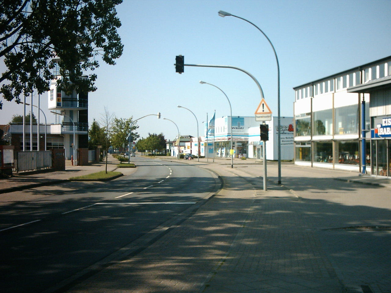 Hansestraße in Richtung Norden